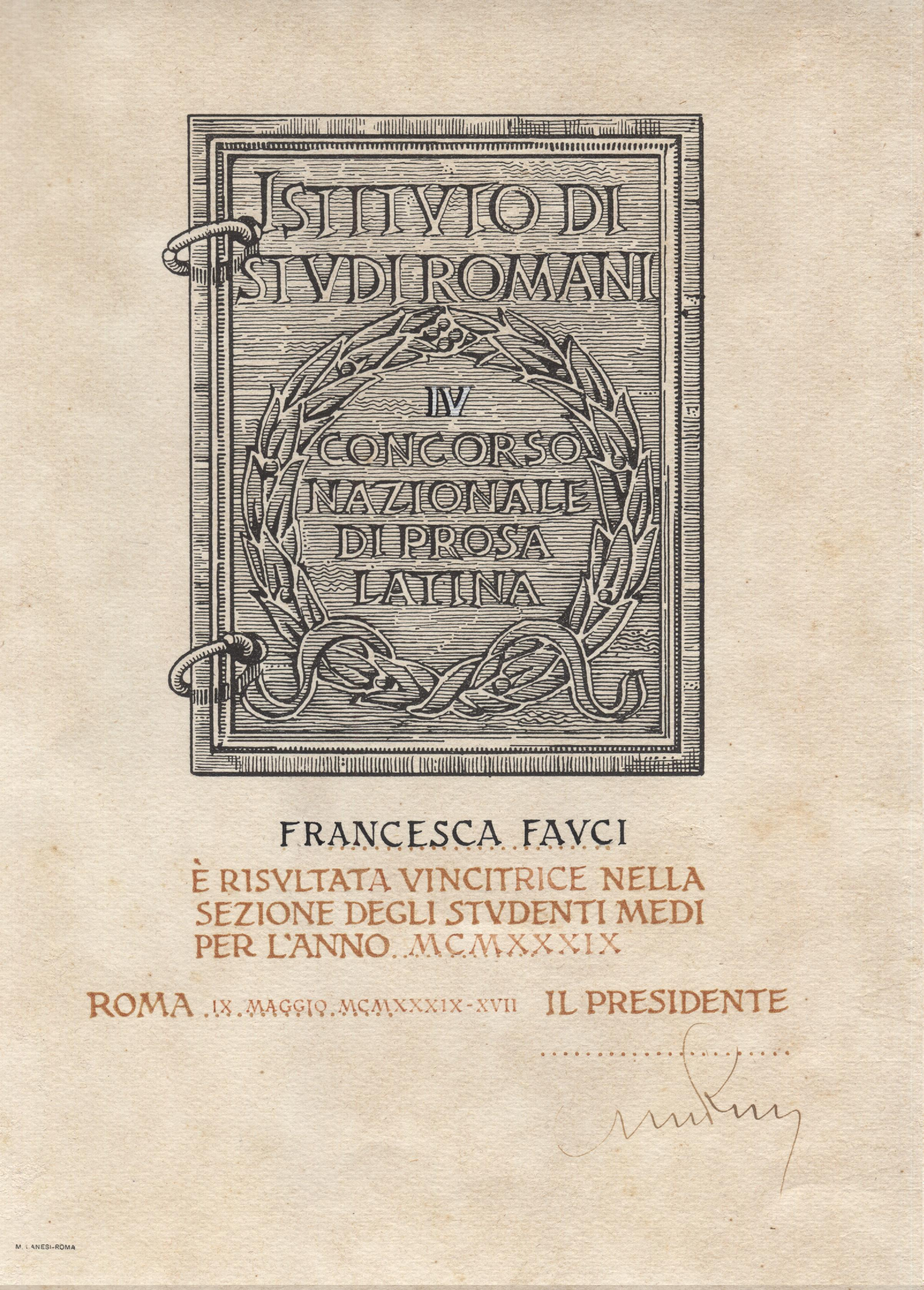 Attestato di Francesca Fauci (1921-2008) per il Premio Letterario di Prosa Latina, 1939.